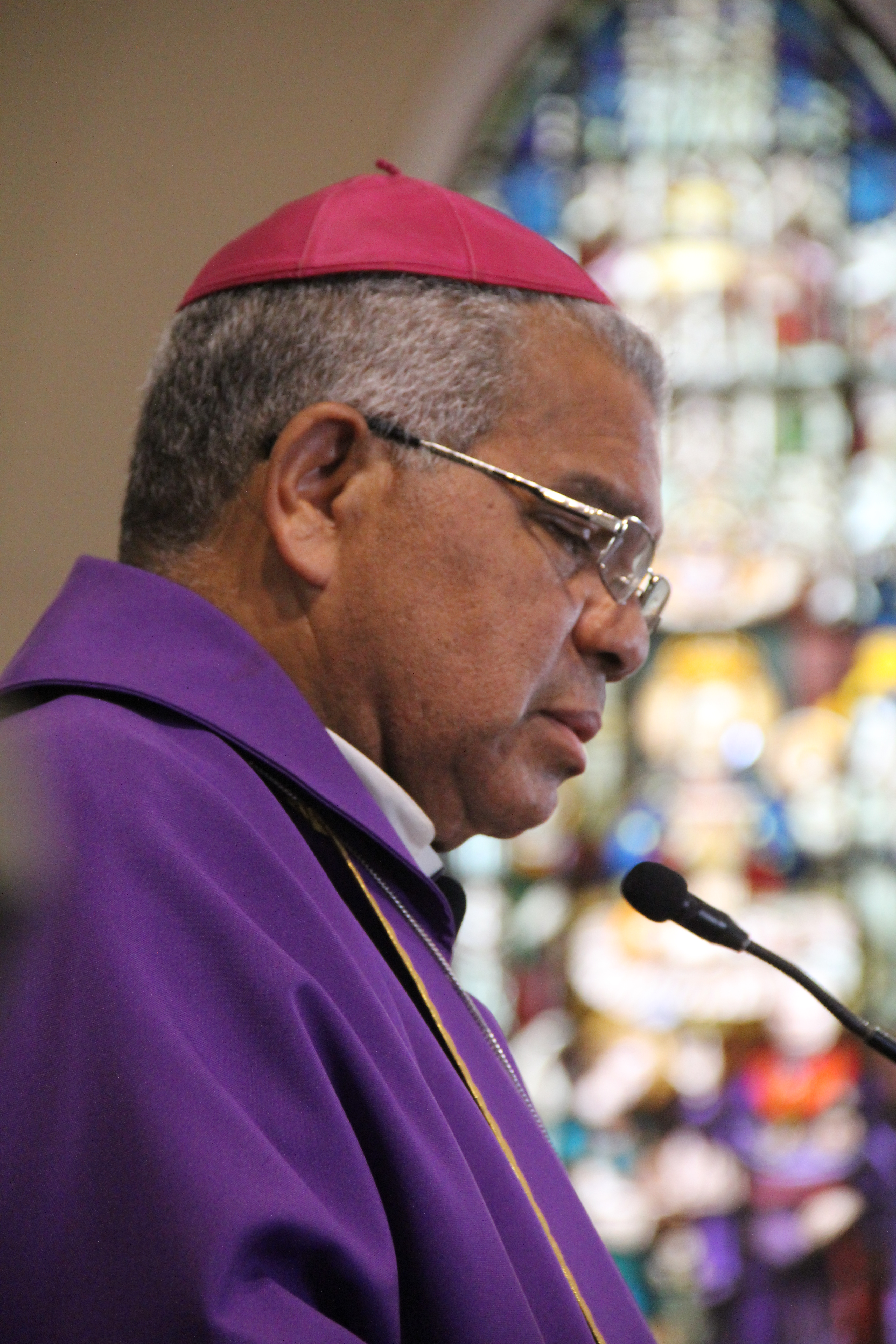 Foto de perfil de Mons. Francisco Ozoria durante la homília en una Santa Misa celebrada en la Catedral de San Pedro de Macorís, tomada por Jovanny Kranwinkel, quien generosamente ha cedido los derechos para su uso.